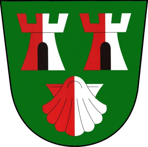 znak, Drahoňův Újezd, okres Rokycany